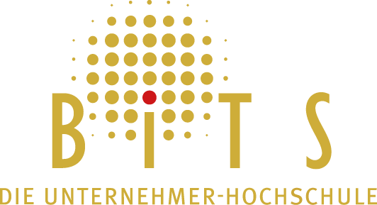 Aktuelles Logo der BiTS Hochschule